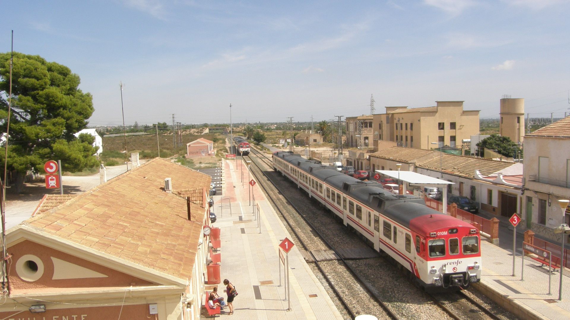 Estació de Crevillent